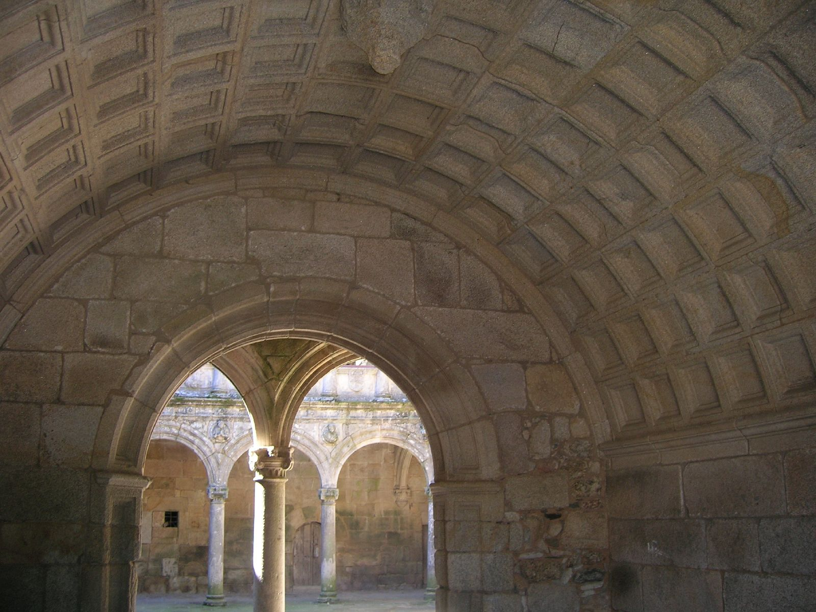 Monasterio de Montederramo. Este paso, cubierto con una bóveda de cañón de casetones, comunica directamente la entrada del monasterio desde la plaza, con el claustro de la Portería.